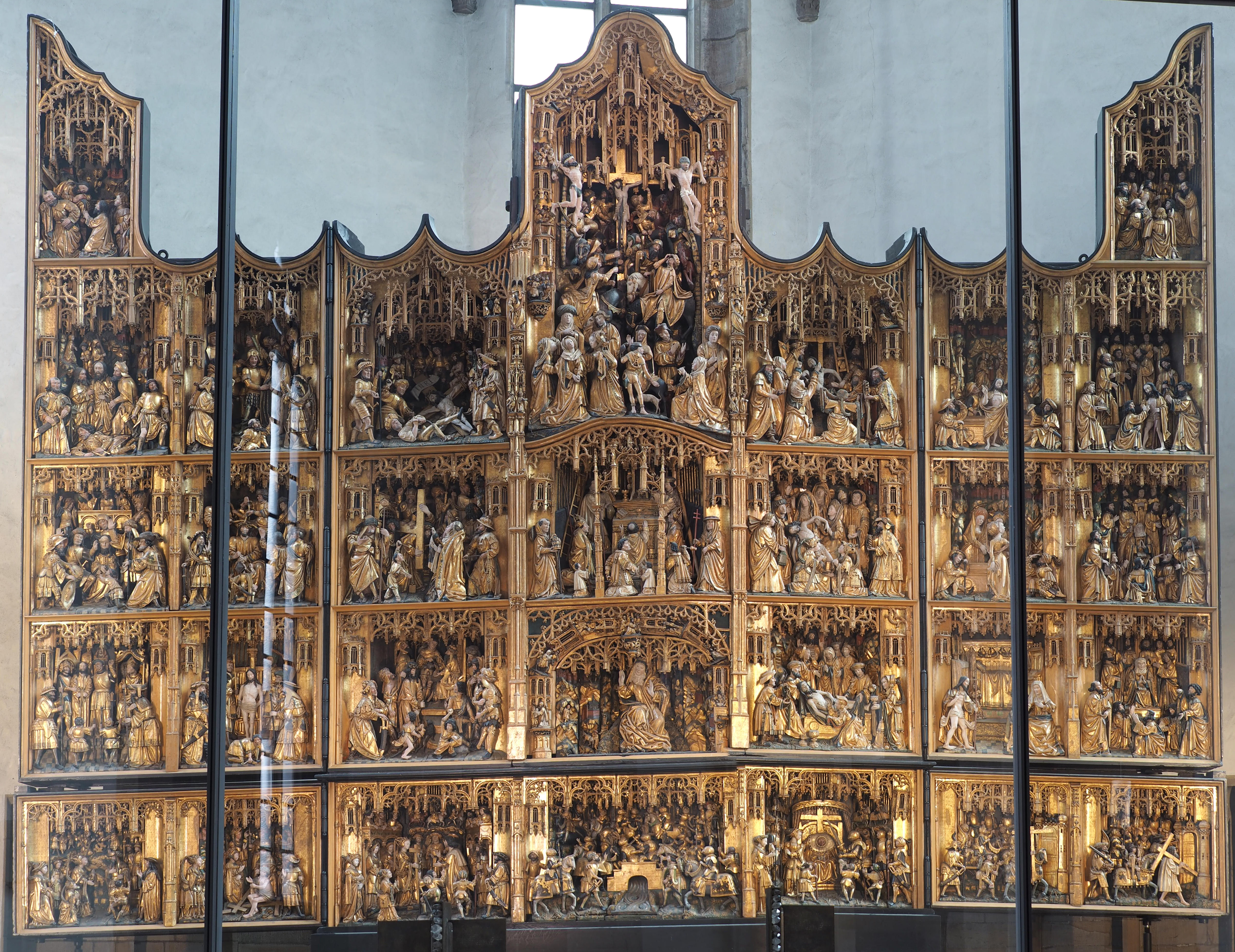 Bildseite der Antwerpener Retabel in der Petrikirche in Dortmund (Goldenes Wunder von Westfalen) eine fünfflügelige Anlage von 7,4 m Breite. (Digital bearbeitet: Das Foto ist eine Montage aus zwei Fotos von unterschiedlichem Standpunkt zur weitgehenden Vermeidung von Fensterpiegelungen auf der Glasfront.)